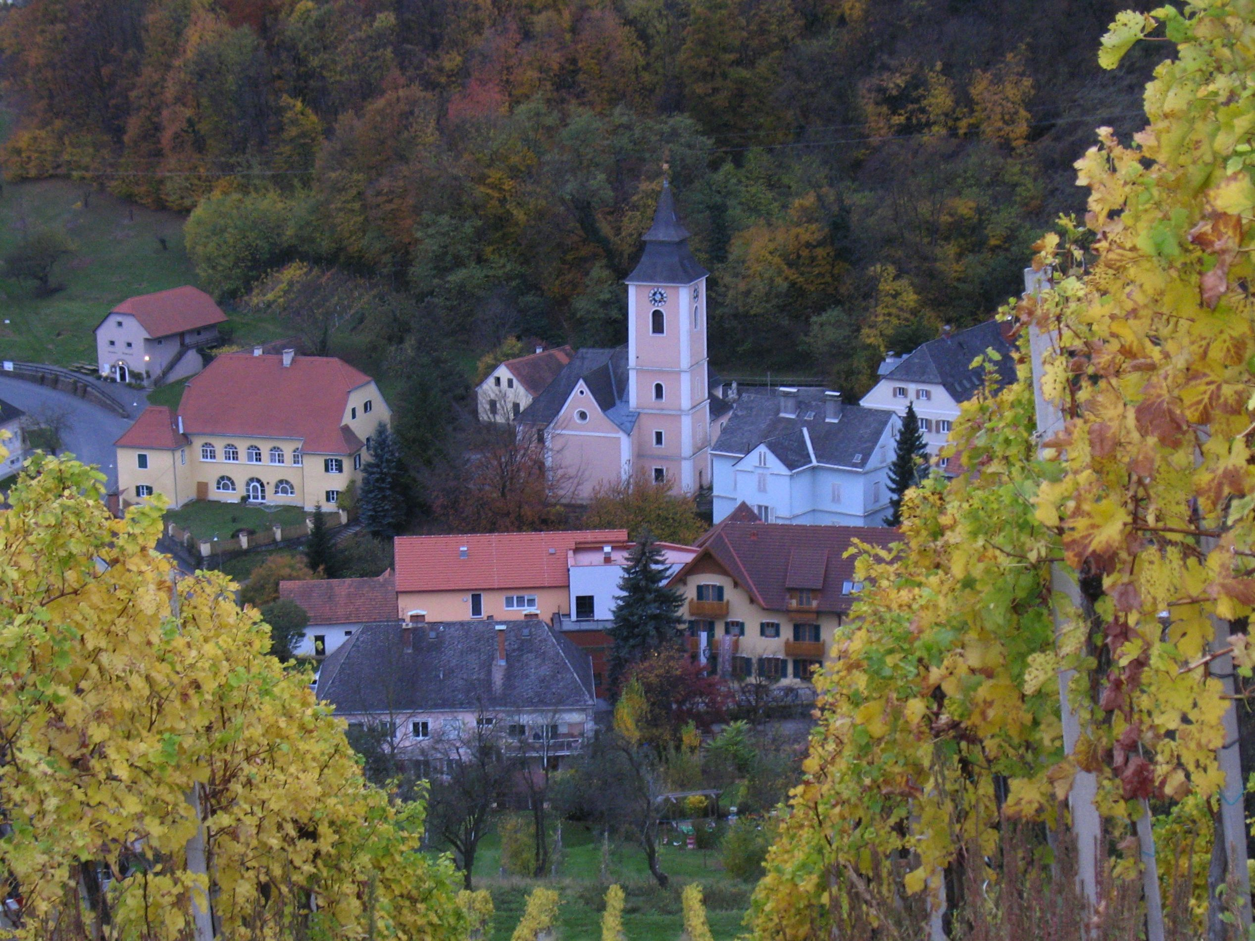 Kath. Pfarrkirche, hl. Georg